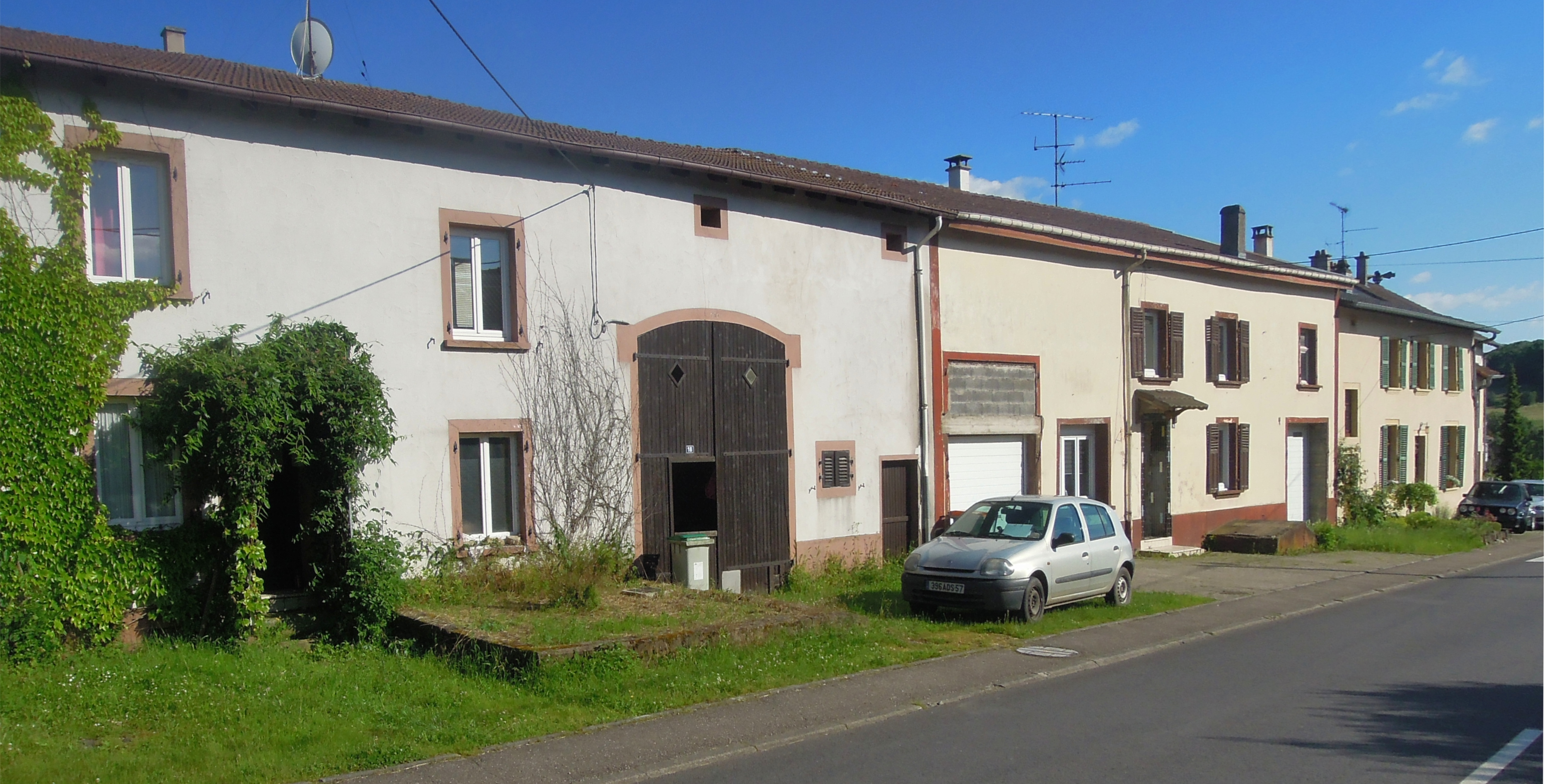 Hauptstraße